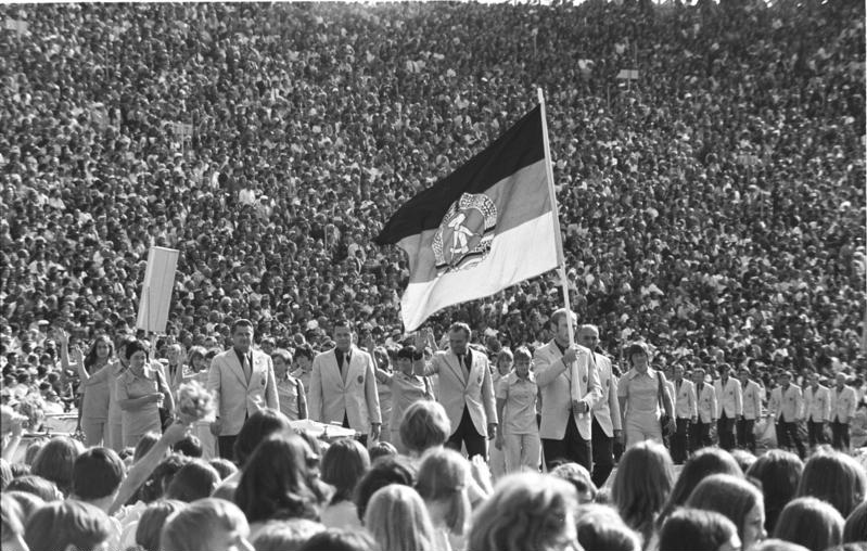 ADN-ZB/Olympiadienst/Gahlbeck/27.8.72 München: XX. Olympische Sommerspiele Eröffnungsveranstaltung am 26.8.72. Ein stolzer Augenblick- erstmals bei Olympischen Sommerspielen marschiert eine selbständige und souveräne Mannschaft der DDR in die Olympische Arena ein.